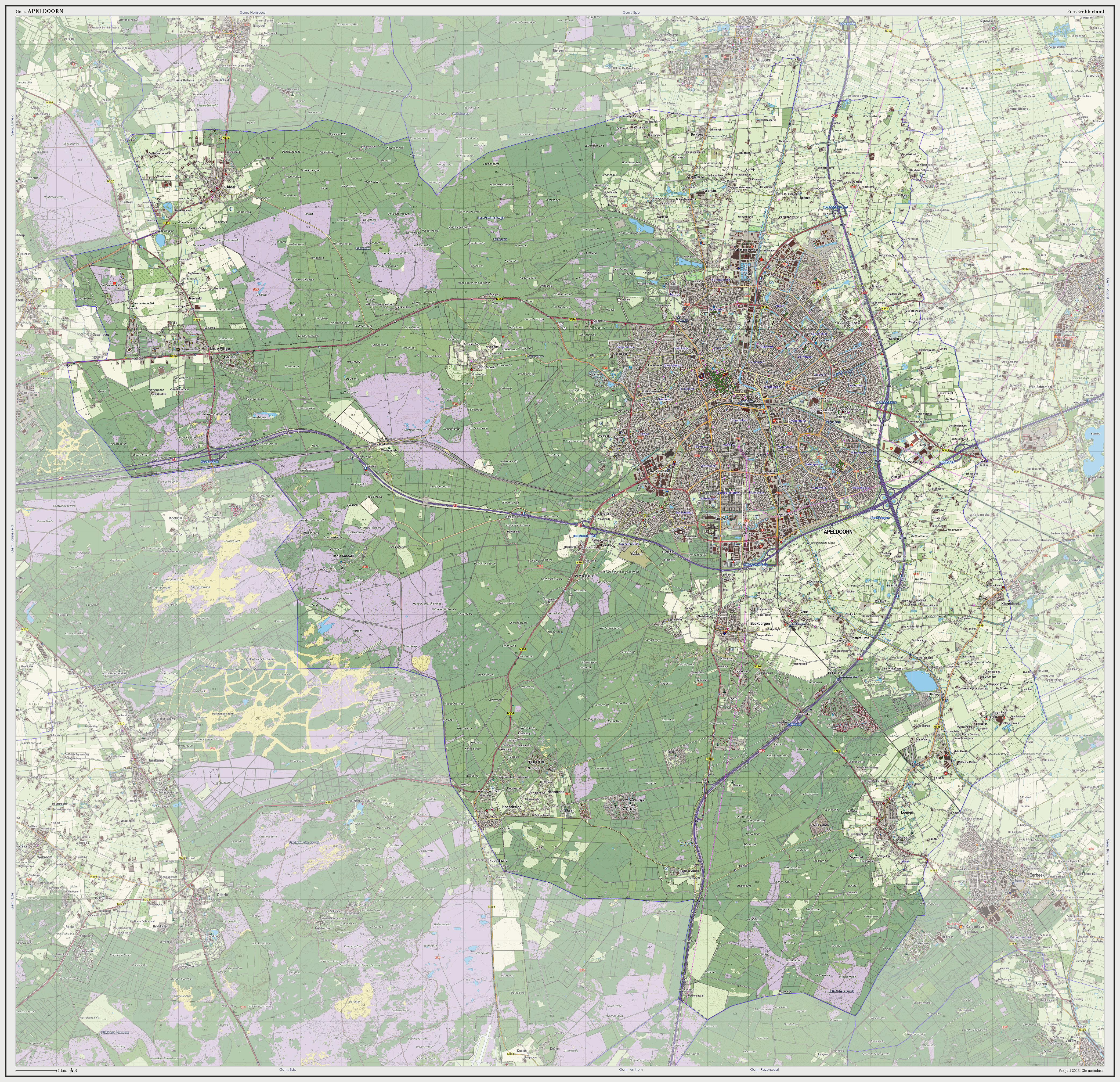 Topografische kaart van gemeente Apeldoorn (2013). Samengesteld door user:janwillemvanaalst op basis van de GML open geodata van de BRT/Top10NL (basisregistratie Topografie, Kadaster 2011), vrijgegeven door Kadaster onder de Creative Commons BY licentie. Additionele gegevens uit BAG (8 juli 2013), uit de Open Street Map (9 juli 2013) en uit de Risicokaart. Peildatum kaartbeeld: 9 juli 2013. Samenstelling en kleurenschema: Jan-Willem van Aalst, met QuantumGIS en Photoshop. Zie ook de Legenda.